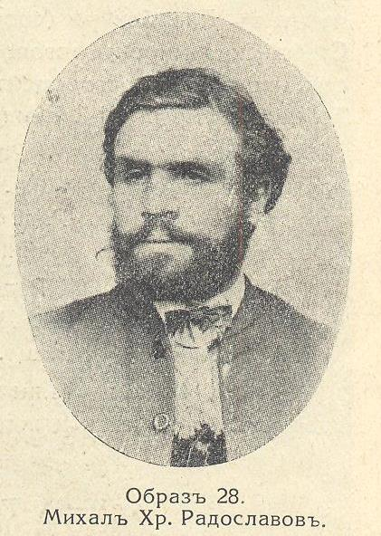 Ловеч и Ловчанско, книга 3, 1931, стр. 127 - Михал Хр. Радославов